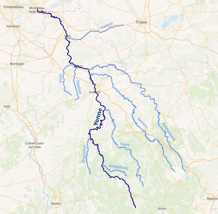 carte réalisée sur umap This map may be incomplete, and may contain errors. Don't rely solely on it for navigation.